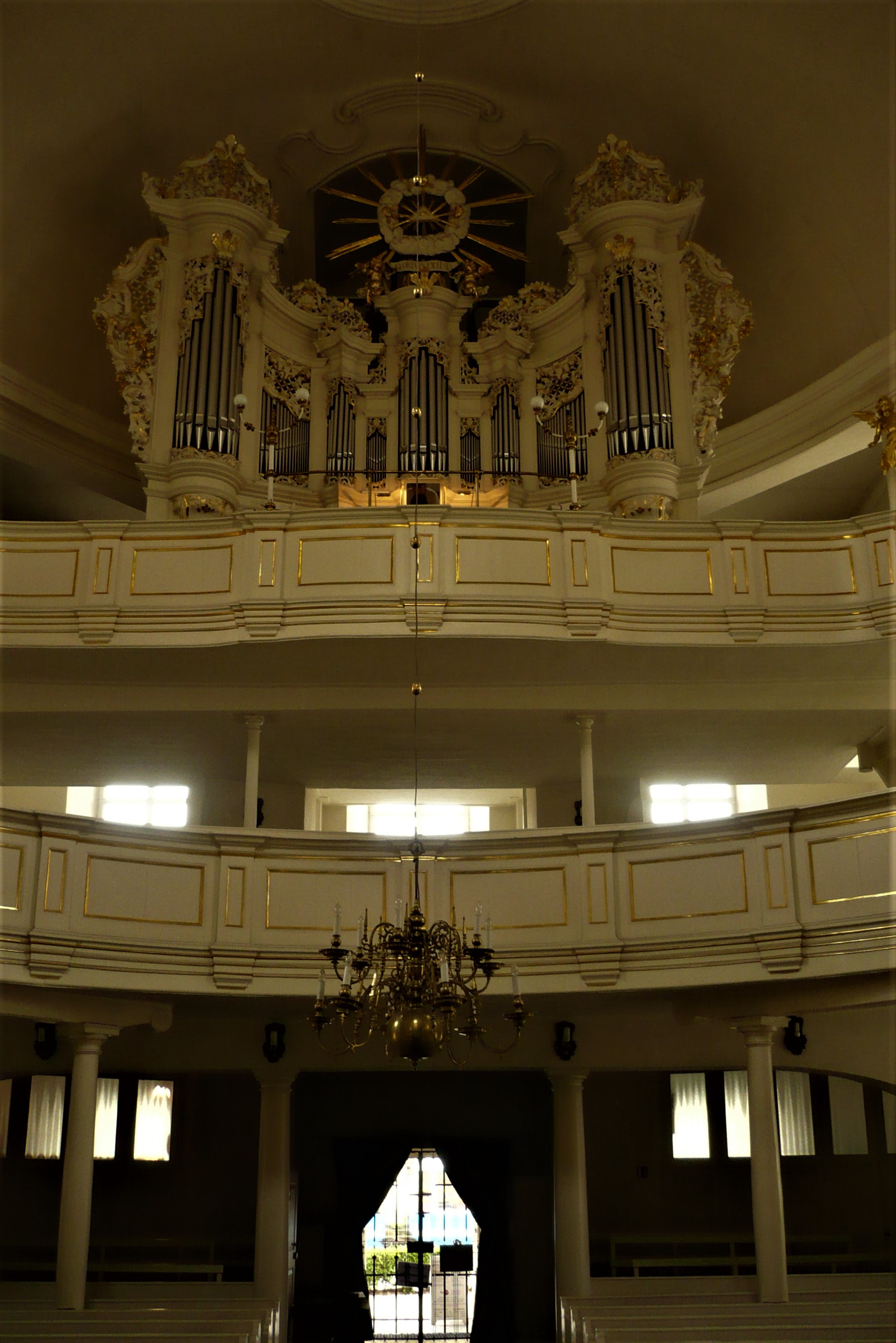 Kościół Opatrzności Bożej we Wrocławiu